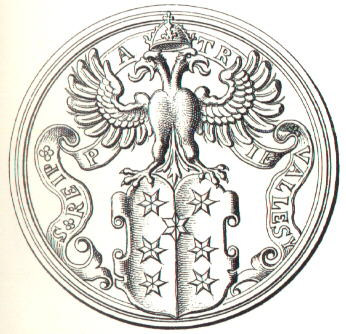 Siegel der Republik Wallis (Oberwallis), 1582. Burgenverein Untervaz (1996, p. 13), mit Verweis auf Louis Mühlemann, Wappen und Fahnen der Schweiz (Lengnau 1991) 140 ff.: Ähnlich [wie in Chur] liegen die Dinge im Wallis, wo der Bischof von Sitten als «PREFECT(us) CO(munitatis) VALES(ii)» auf einem Doppeltaler von 1501 seinem von der Mitra überhöhten Wappenschild nur den Bischofsstab und das Schwert als Zeichen seiner geistlichen und seiner reichsfürstlichen Würde unterlegt hat, während die Republik Wallis auf ihrem Siegel von 1582 mit der Aufschrift «S(igillum) REIP(ublice) PATRIE VALLESY» auf den oberen Schildrand ihres hier erstmals begegnenden Sternenwappens den Doppeladler gesetzt hat. Letzterer wurde zweifellos vom geistlichen Reichsfürstentum entlehnt. Der Sittener Fürstbischof Hildebrand von Riedmatten beschritt hierauf den Weg des Kompromisses und bildete aus seinem persönlichen Wappenschild, jenem der Republik und jenem der Stadt Sitten eine Wappendreiheit, die er dem Doppeladler des Reiches aufgelegt hat, ohne es freilich dabei zu unterlassen, seinen Schild mit der Mitra zu bekrönen und mit Hirtenstab und Schwert zu unterlegen.